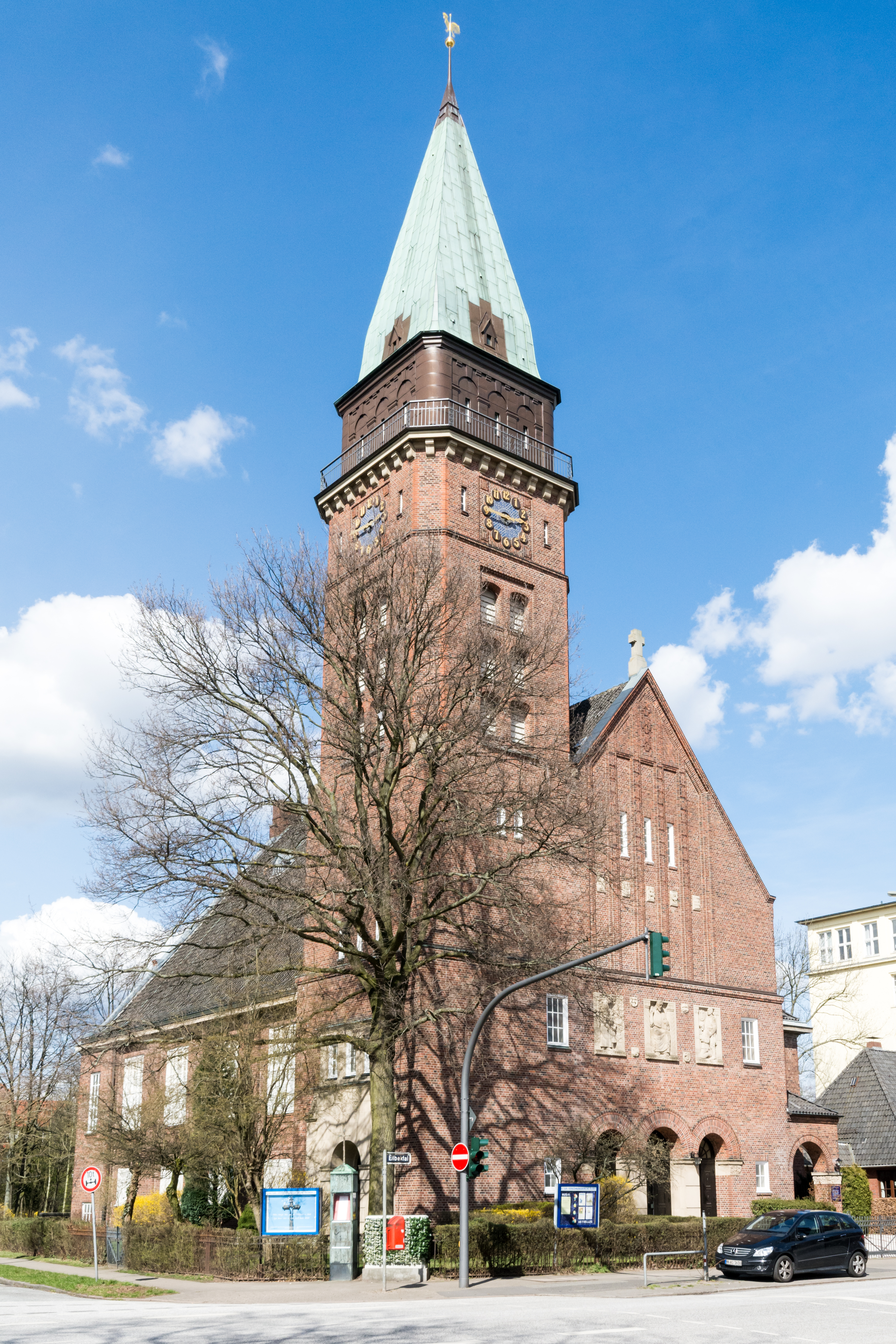 Versöhnungskirche in Hamburg-Eilbek. This is a photograph of an architectural monument.